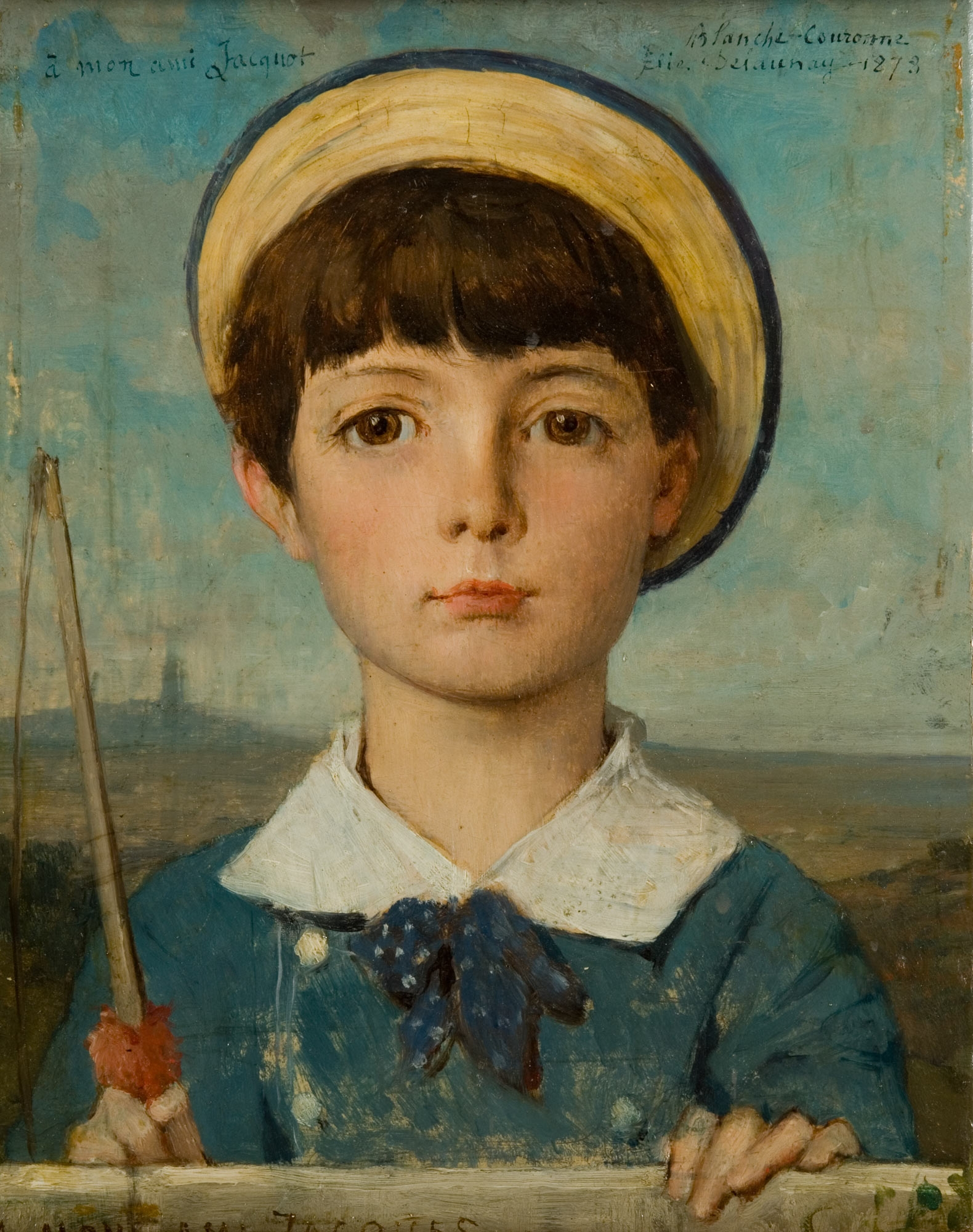 Portrait de Jacques Bizet enfant, fils de Georges Bizet et de Geneviève Halévy